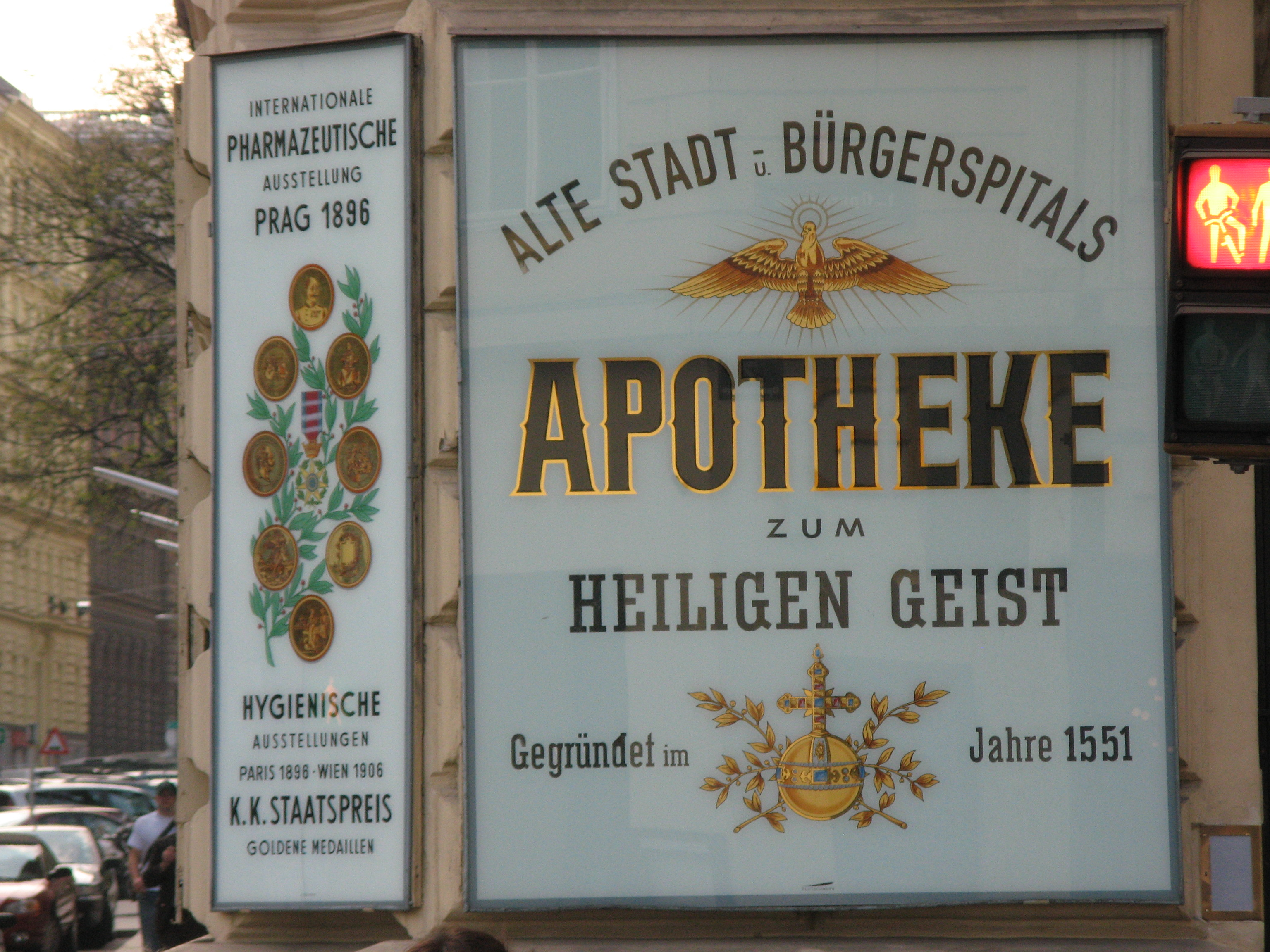 Apotheke, Operngasse 16, Wien-Innere Stadt